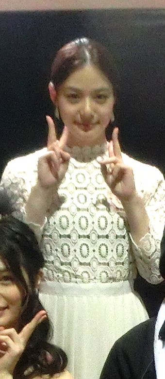 吉高寧々2018年 DMM R-18 アダルトアワード2018（ディファ有明）